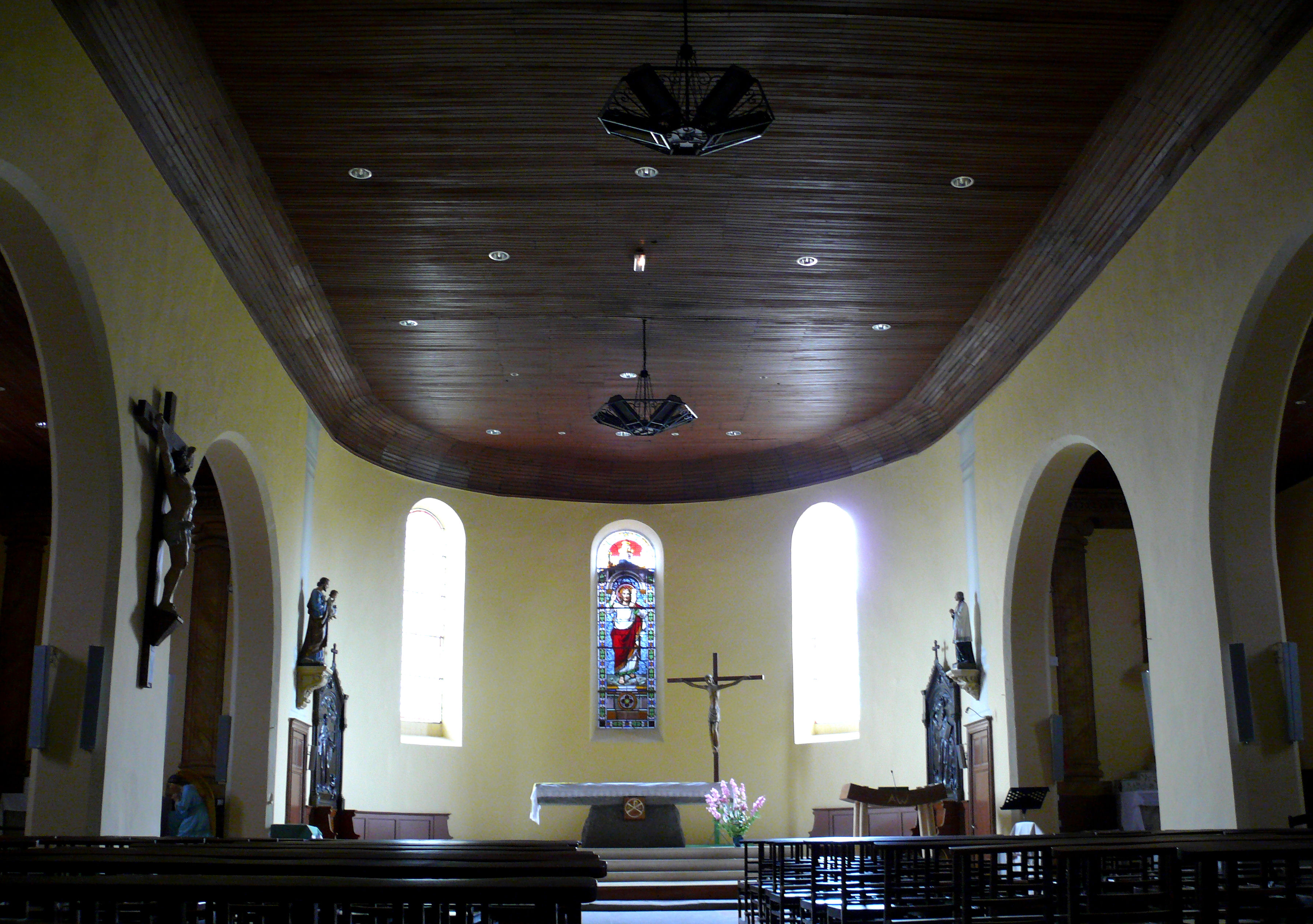 Villeneuve-sur-Lot - Eglise Saint-Sernin d'Eysses